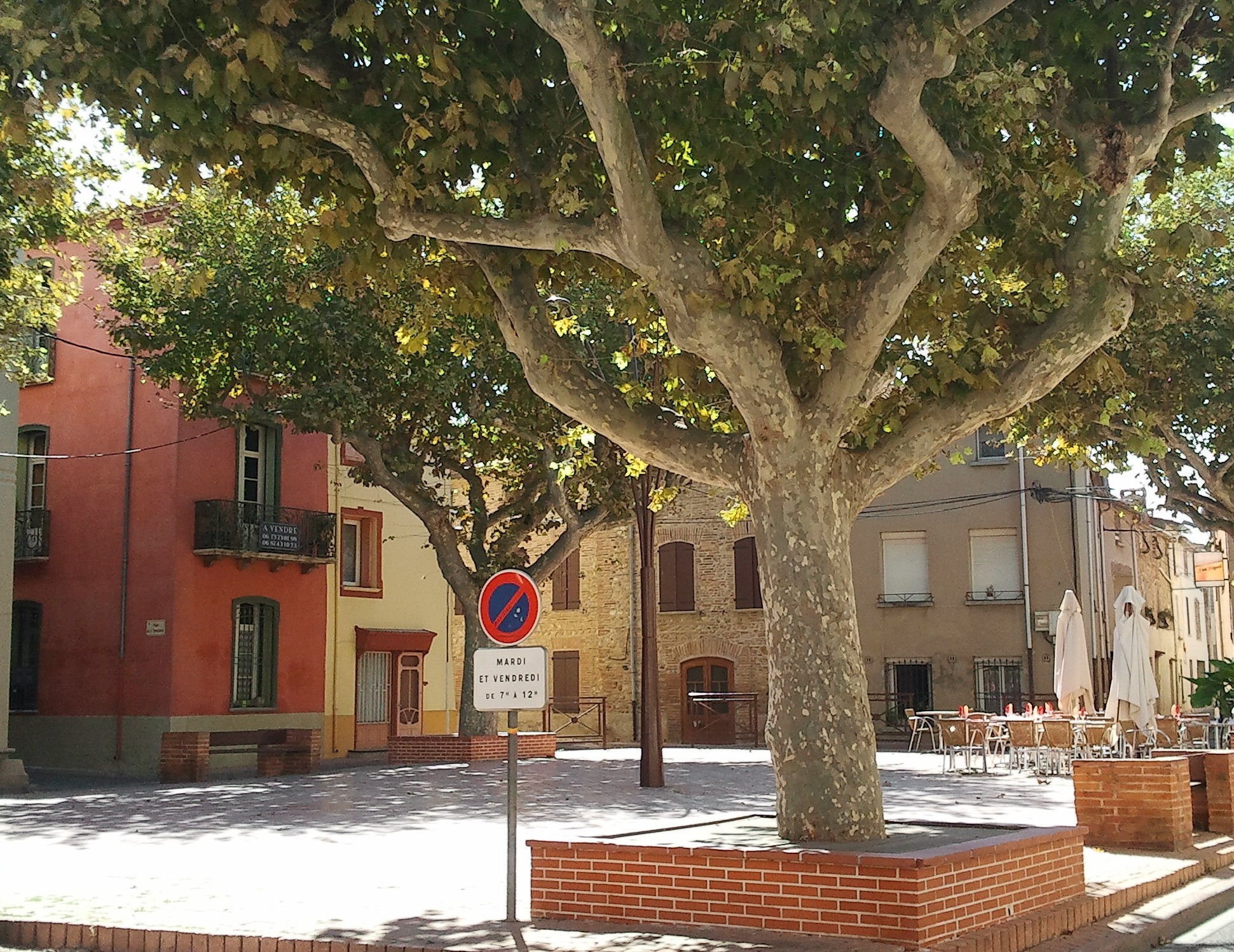 Place Louis Blasi (ouest) à Torreilles